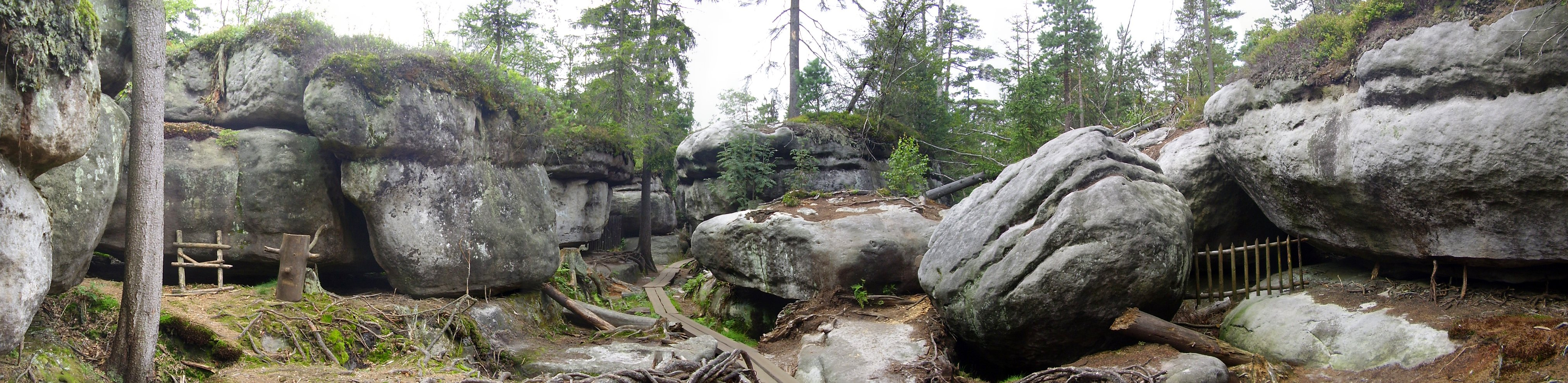 Błędne Sakły